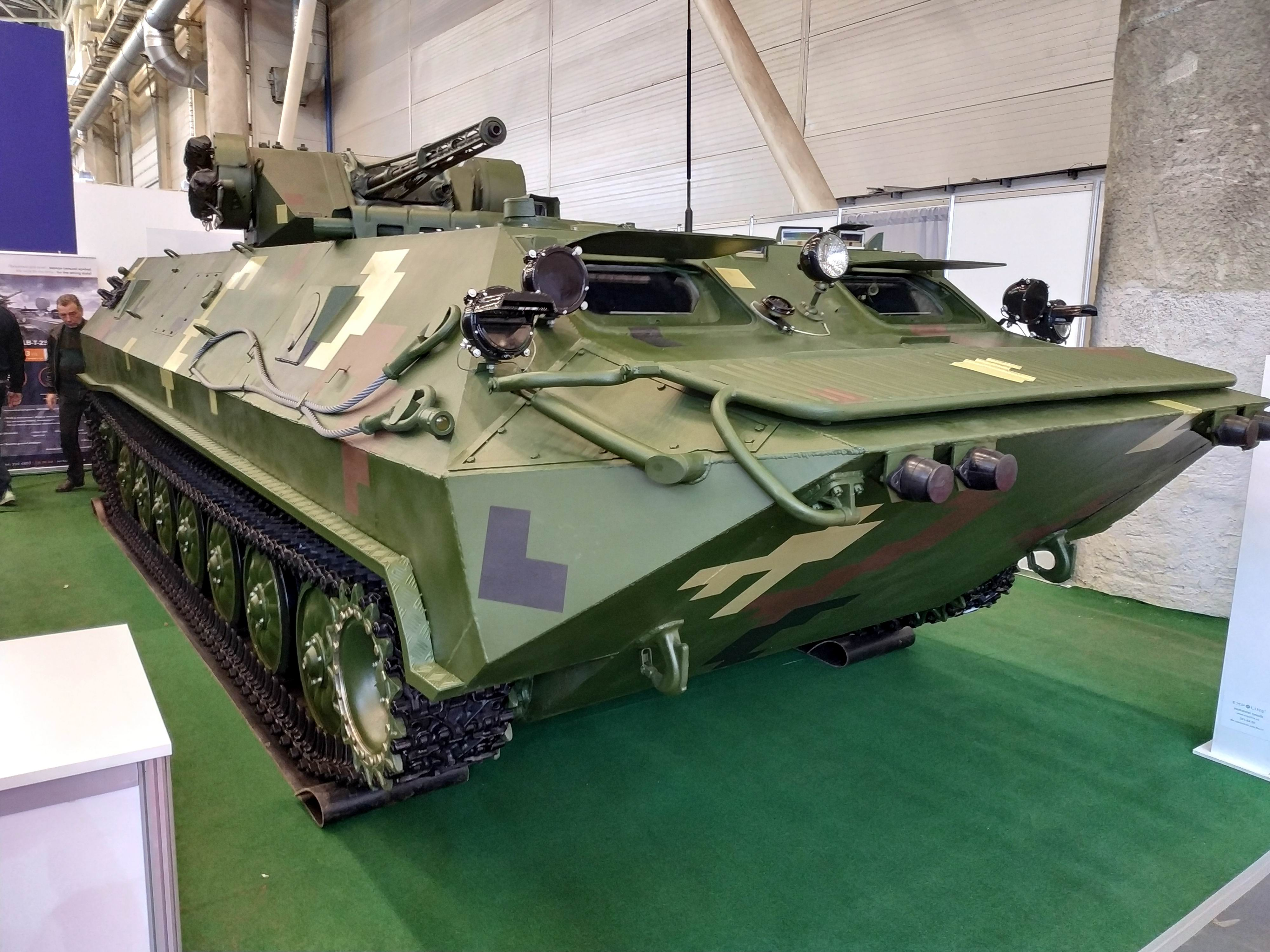 Бронетранспортер "Плавець" с боевым модулем "Спис" в экспозиции НПК "Техимпекс". Выставка "Зброя та безпека", Киев, октябрь 2018 г.